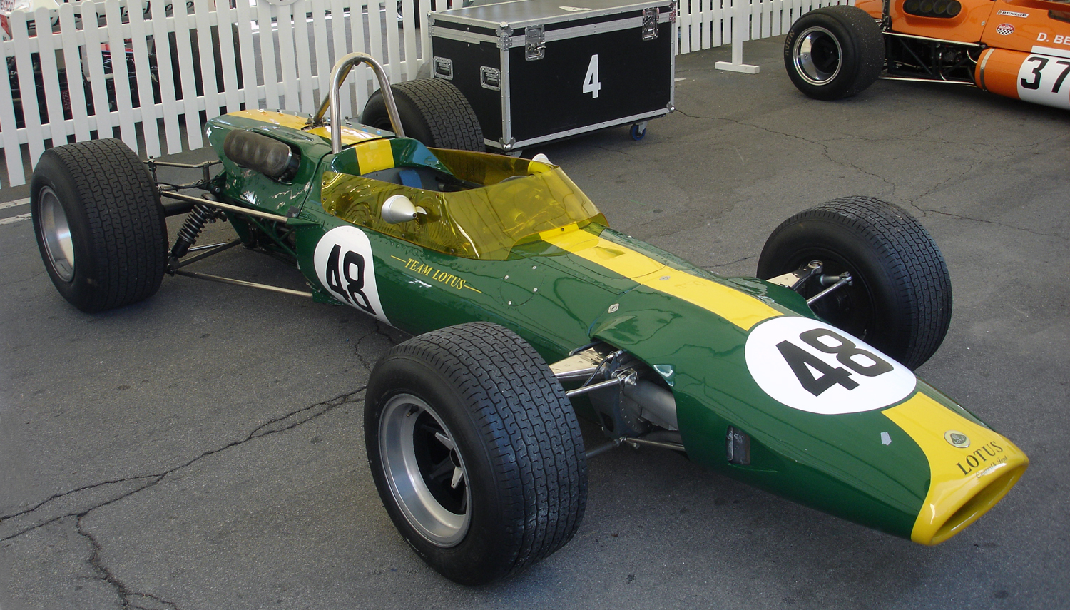 Lotus 48, exposat al festival Martini Legends (commemoració del 75 aniversari del Circuit de Montjuïc)